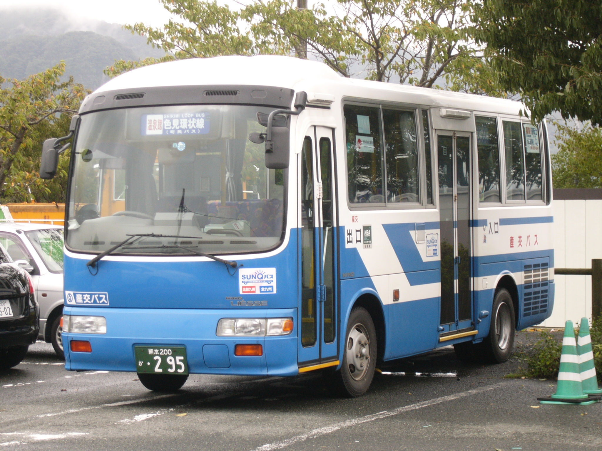 登録番号：熊本200か295（高森町民バス「色見環状線」） 撮影場所：高森駅にて